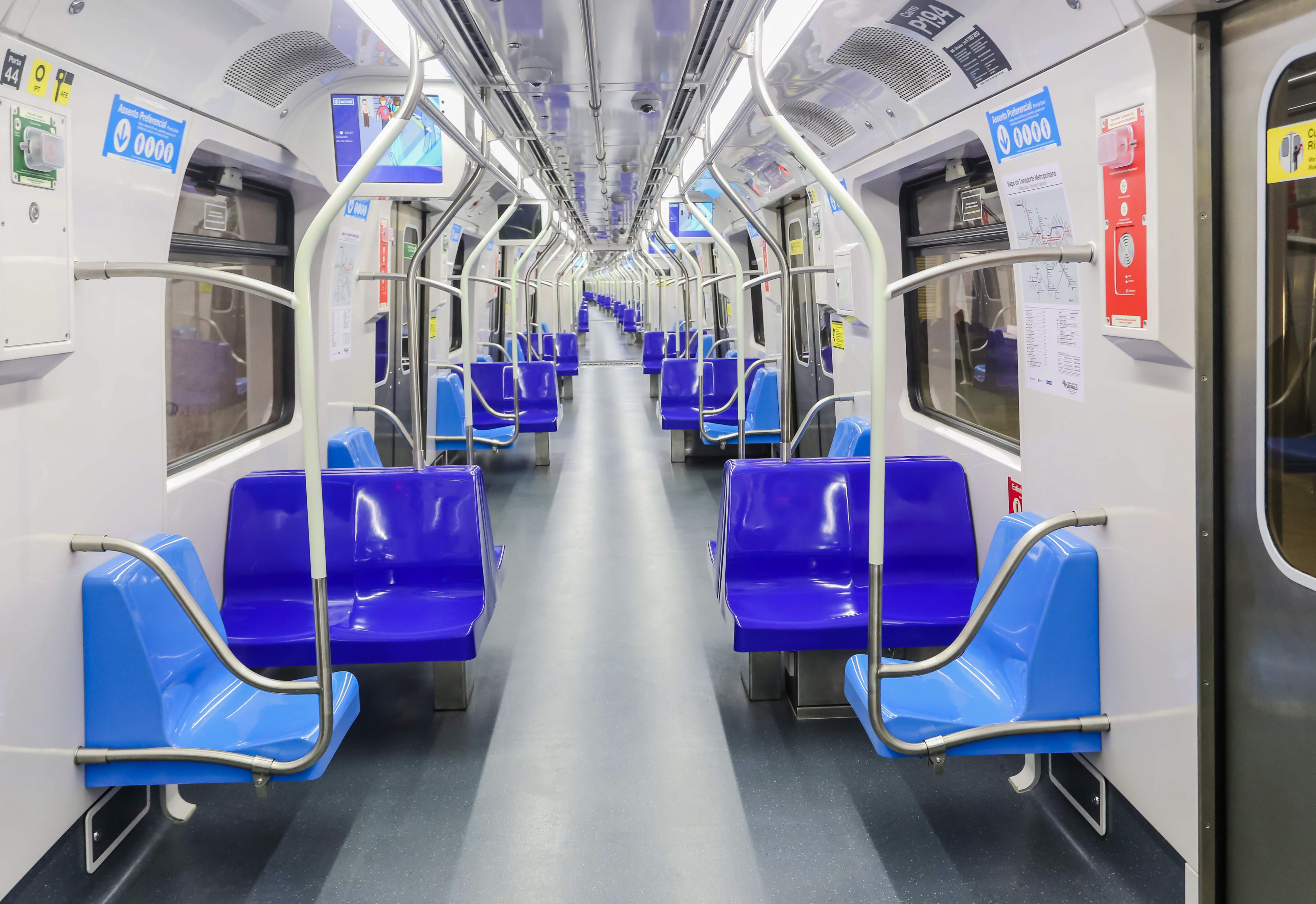 O Governador do Estado de São Paulo Geraldo Alckmin, participouda Primeira Viagem de trem do trecho Adolfo Pinheiro - Brooklin da linha 5 - Lilás do Metrô. Local: São Paulo/SP. Data: 20/05/2017. Foto: Alexandre Carvalho/A2img